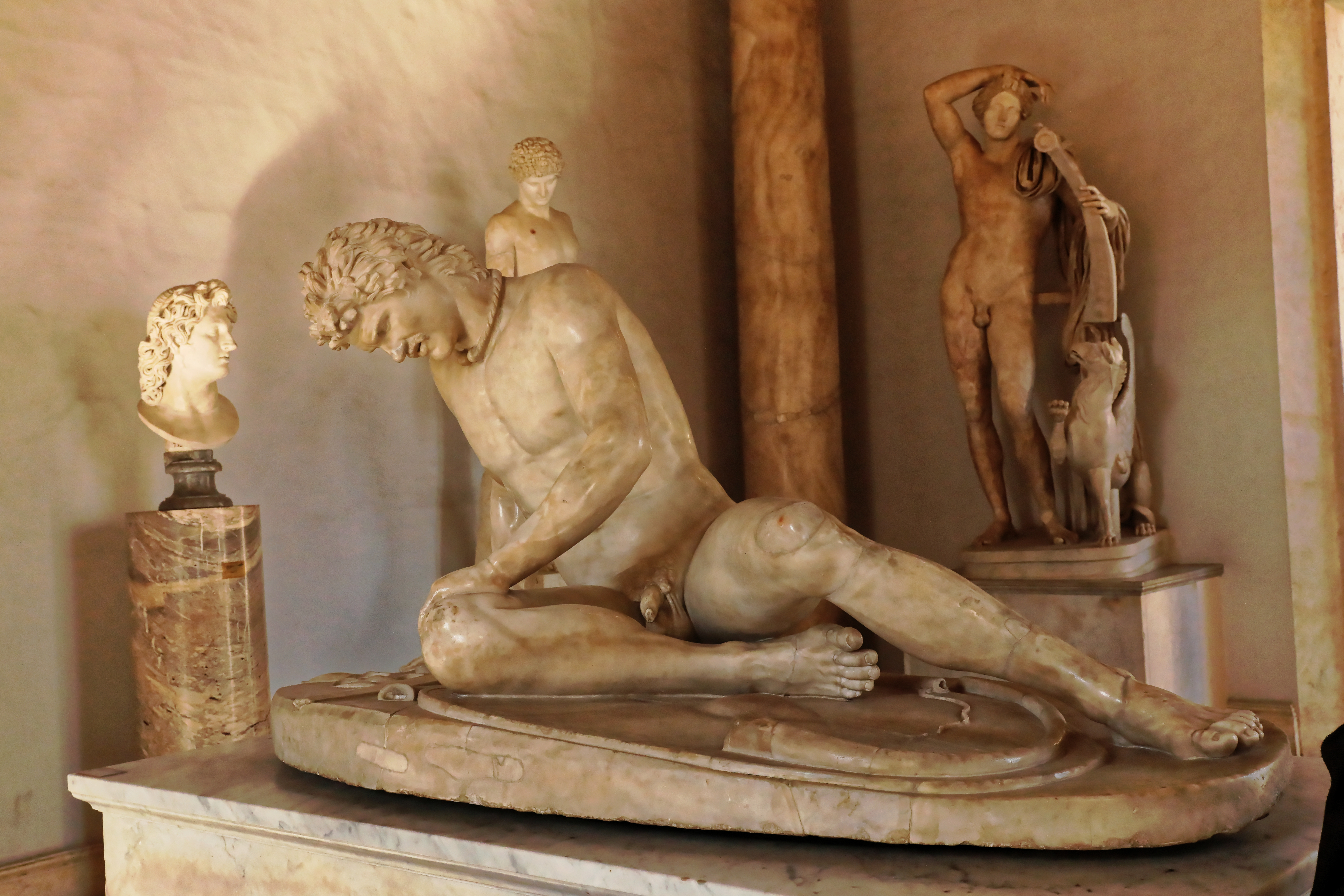 Sterbender Gallier, eine antike Marmor-Statue, in den Kapitolinischen Museen in Rom.Das Werk ist die römische Kopie eines Originals, das etwa um 230/220 v. Chr., vermutlich in Bronze entstand